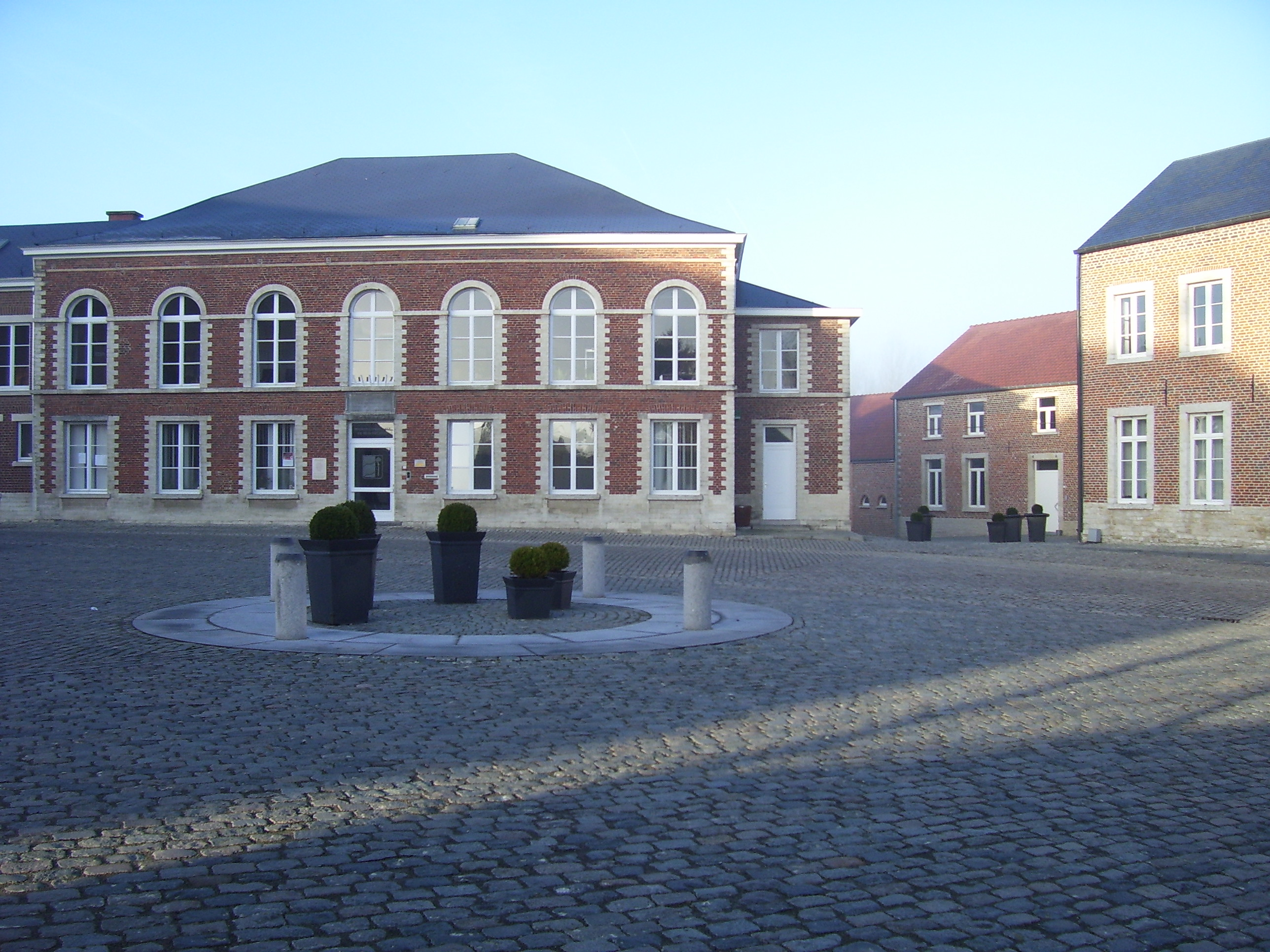 Maison Communale (municipality) and Place Communale of Beauvechain, Belgium